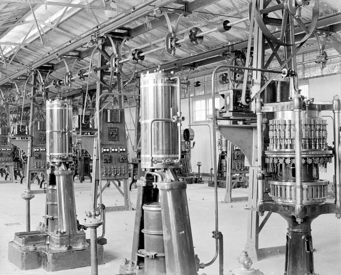 Negatief. De vulkamer van een opiumfabriek te Weltevreden, Java